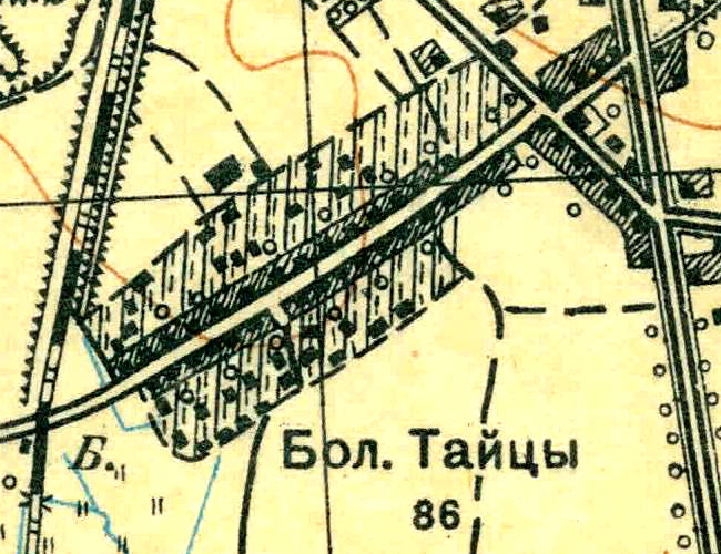 Топографическая карта Ленинградской области, квадрат О-36-13-А-а (Большая Пудость), деревня Большие Тайцы